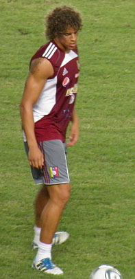 Rolf Feltscher entrenando con la Selección de fútbol de Venezuela.